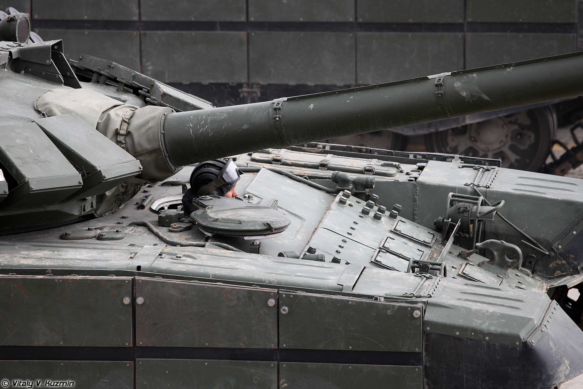 Модернизированный Т-72Б3 образца 2016 года с дополнительной защитой (Modernized T-72B3 with additional armor)